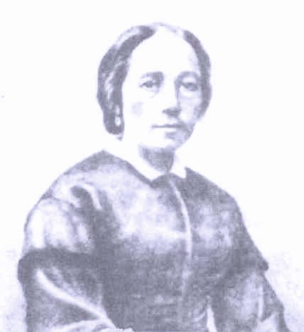 Portrait de la goguettière Rose Harel